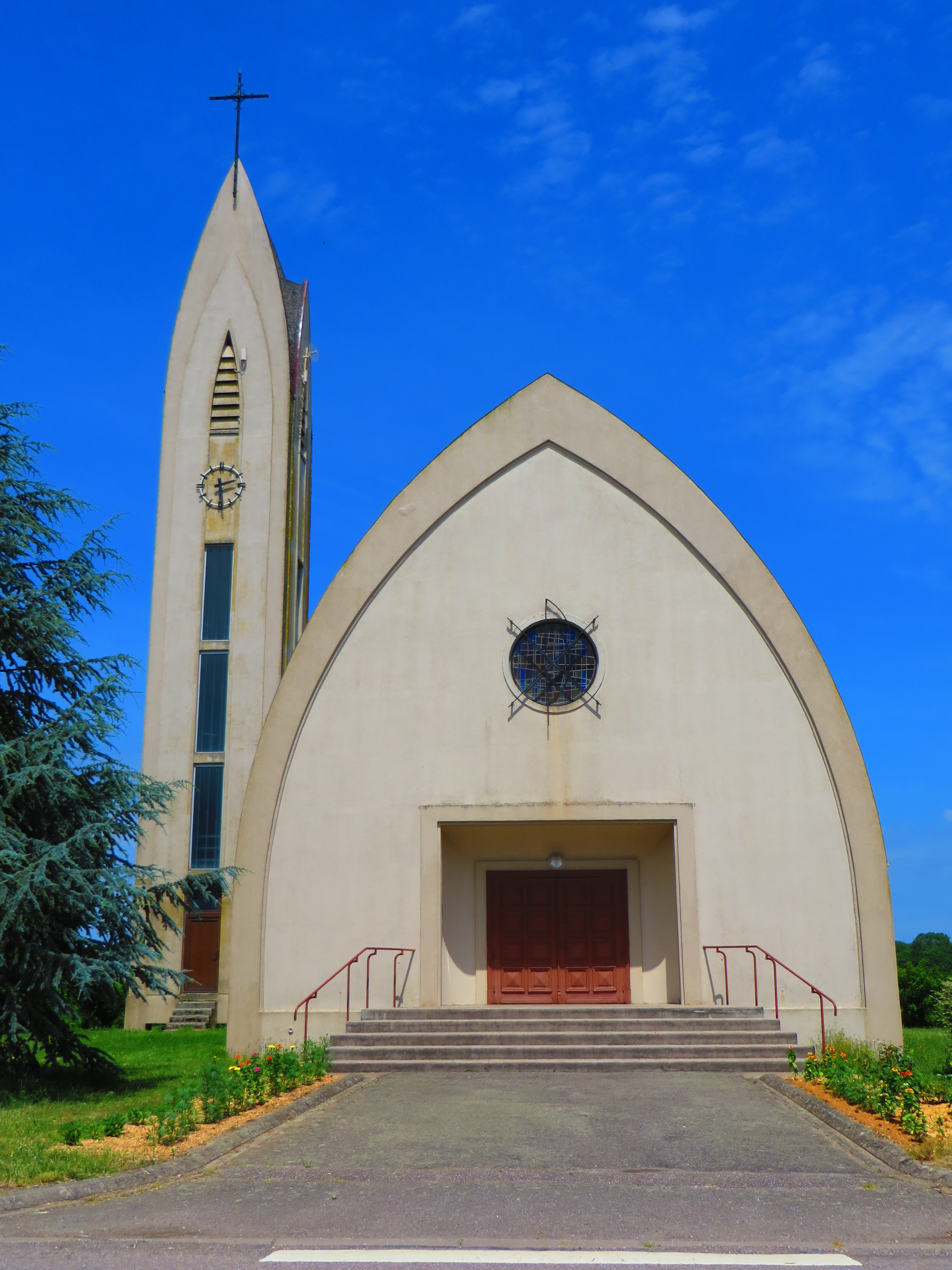 Igney 54 eglise